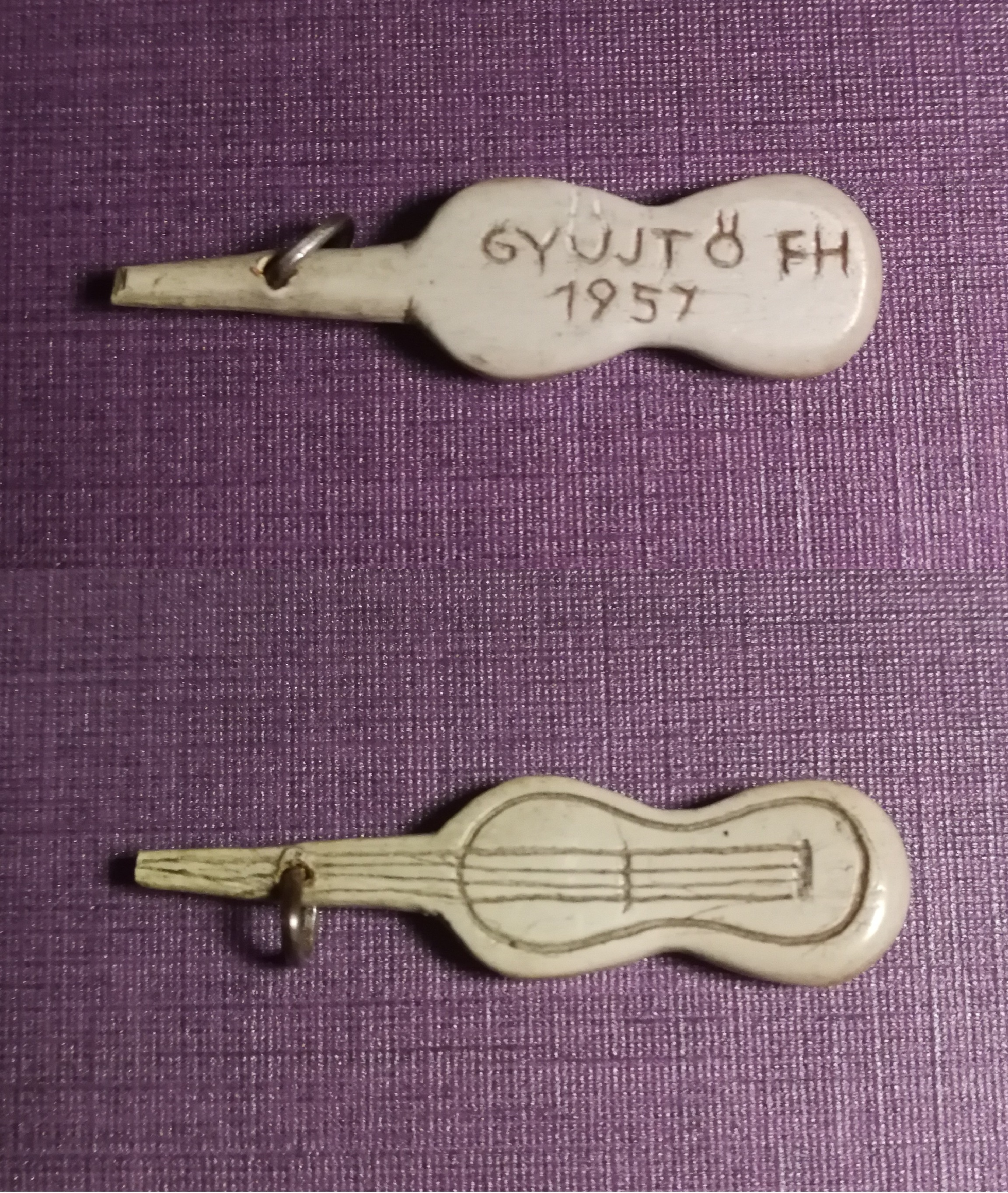 Fogkeféből cipősarokvassal faragott hangszer, amelyet Pintér Tamás író, politikai fogoly készített a börtönben 1957-ben